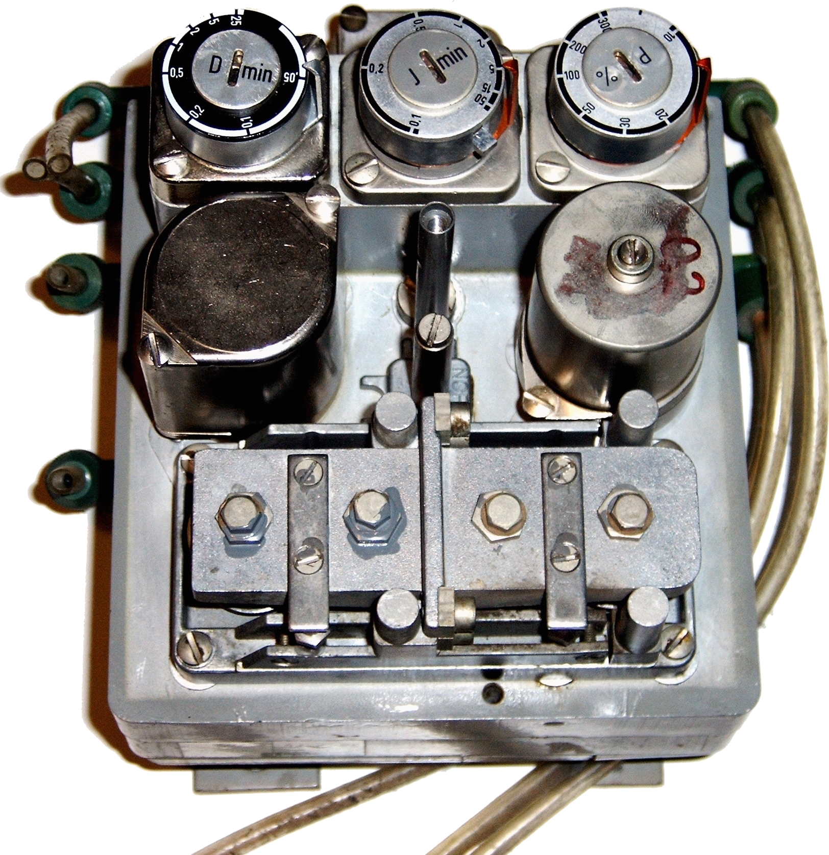 Zelfgemaakte foto van een pneumatische regelaar Siemens Telepneu